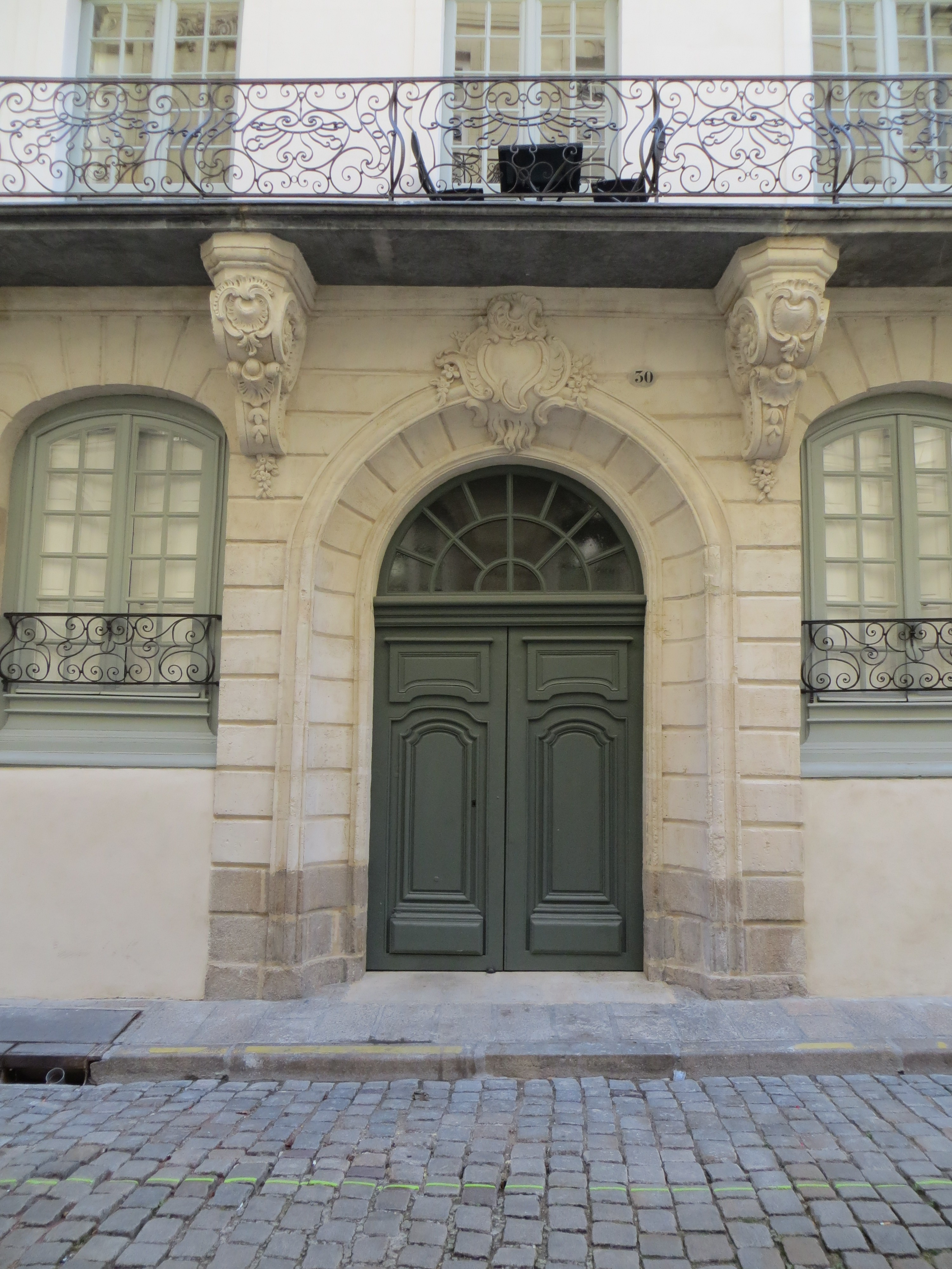 Temple du Goût entrée côté rue